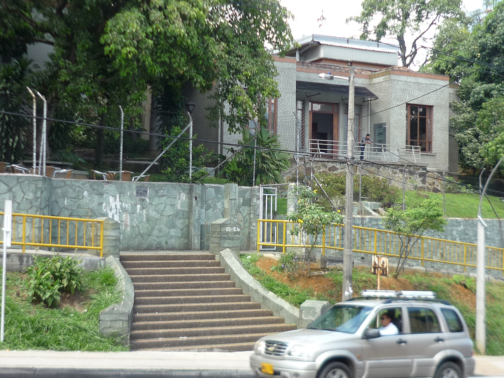 La Casa Museo Maestro Pedro Nel Gómez es un sitio cultural de la ciudad de Medellín, Colombia, constituida por el Maestro Pedro Nel Gómez y su familia el 15 de noviembre de 1975, con el objeto de conservar la casa, su acervo artístico, bibliogràfico y documental como un patrimonio cultural y artístico de la ciudad de Medellín y de Colombia. Está ubicada en el barrio Aranjuez de Medellín.